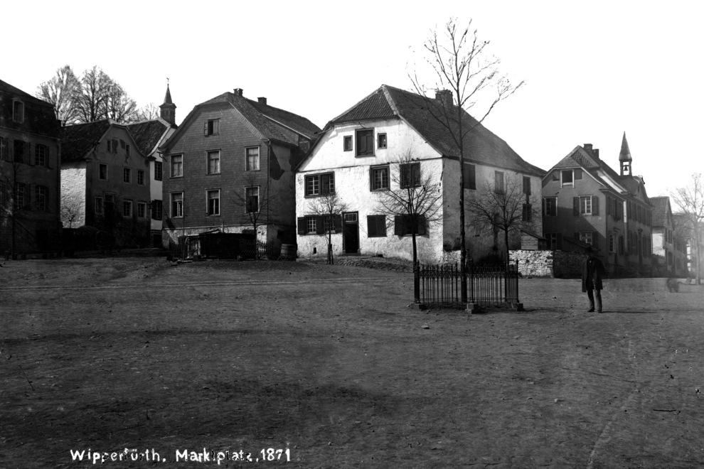 Marktplatz von Wipperfürth 1871. Digitalisierung von einer Glasplatte.